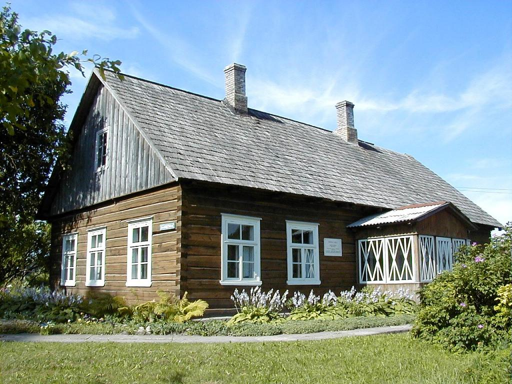 Zvanītāju Bukas - Amtmaņu muzejs Vallē 2002-07-18